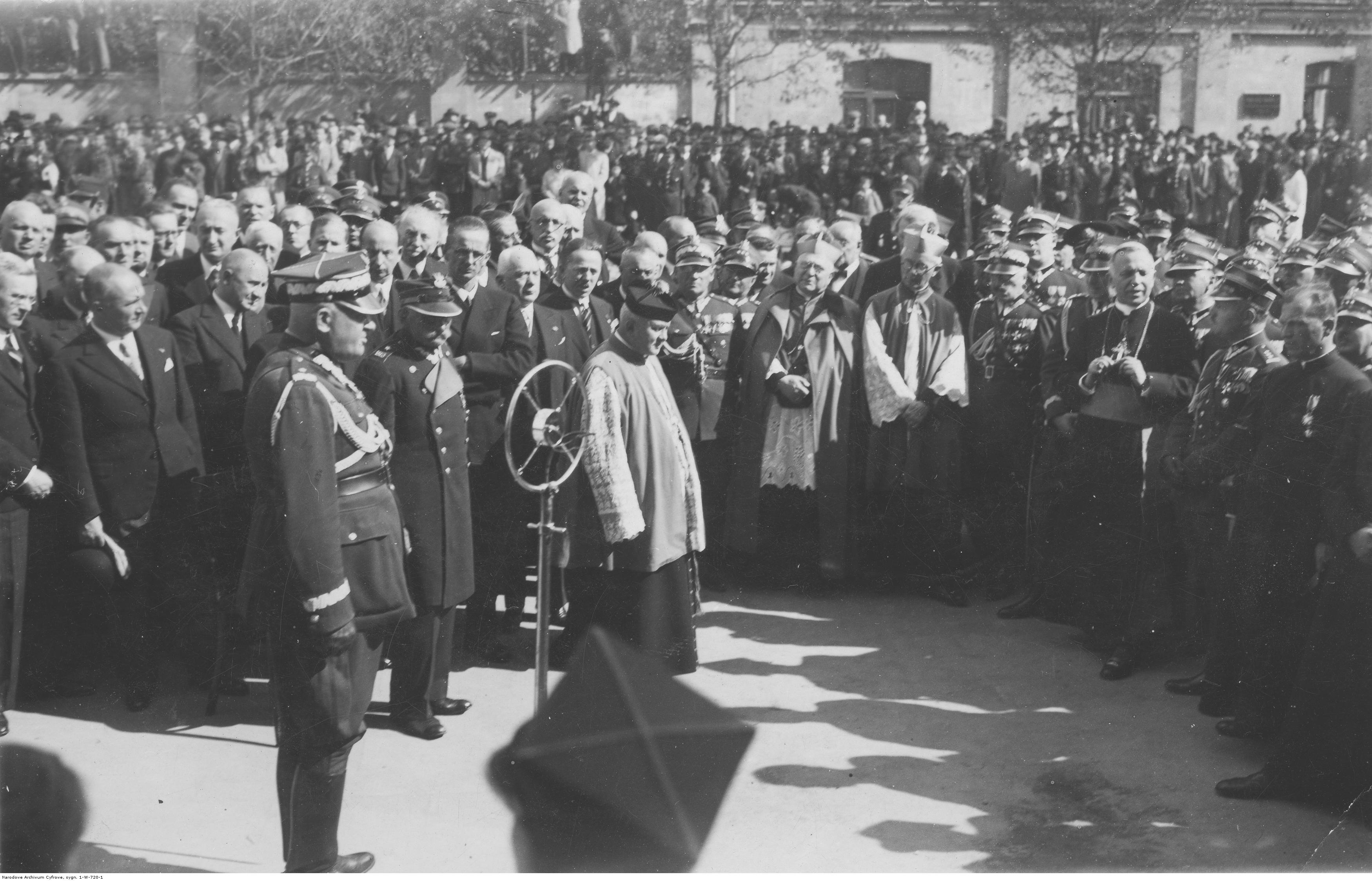 Otwarcie IV Okręgowego Szpitala Wojskowego im. gen. Sławoja Składkowskiego w Łodzi; kwiecień 1937. Uczestnicy uroczystości słuchają przemówienia gen. Stanisława Roupperta. Widoczni także m.in.: biskup polowy Józef Gawlina (w pierwszym rzędzie 3. z prawej), gen. Aleksander Litwinowicz, prezydent Mikołaj Godlewski, wicewojewoda Stefan Wendorff. Koncern Ilustrowany Kurier Codzienny - Archiwum Ilustracji. Sygnatura: 1-W-720-1